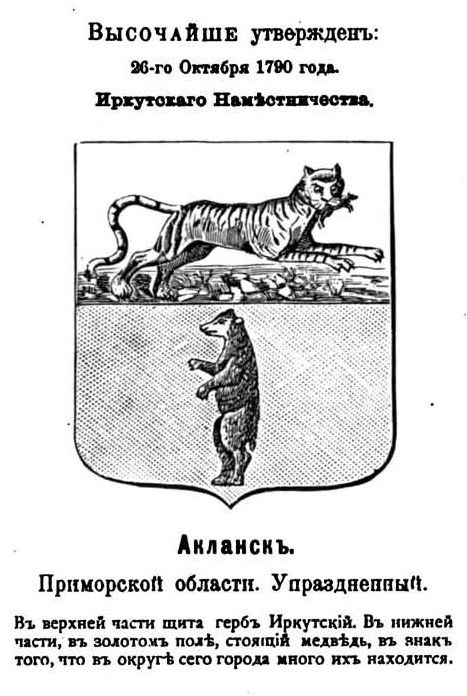 Герб Акланска Приморской области 1790 года с описанием из гербовника Винклера